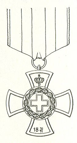 Afbeelding van het kruis